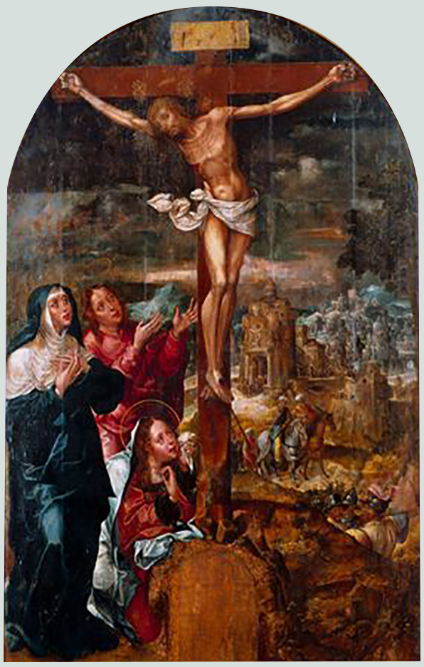 Este painel, juntamente com a "Adoração dos Pastores" (ME 1520) e a "Ressurreição de Cristo" (ME 1522), forma o conjunto pintado por Gregório Lopes, em 1544,para os três altares da Igreja do Bom Jesus de Valverde, por encomenda do Cardeal D. Henrique. Dentro da igreja este painel ficava no altar principal,a "Adoração dos Pastores" no lado da Epístola e a "Ressurreição" no lado do Evangelho pois os painéis distribuiam-se segundo uma sequência narrativa adequada à circulação interna do espaço que, tratando-se de uma planta de cruz grega formada por quatro octógonos dispostos simetricamente em volta de um octógono central e com a entrada pelo octógono fronteiro ao do altar-mor, mas por uma abertura lateral, se faz no sentido da direita para a esquerda e não pelo sentido inverso, como é mais usual. Por despacho de Maio de 1929, do Ministro da Instrução, o Director da Escola Regional de Agricultura entrega os quadros ao Museu de Évora a 13 de Junho desse ano.